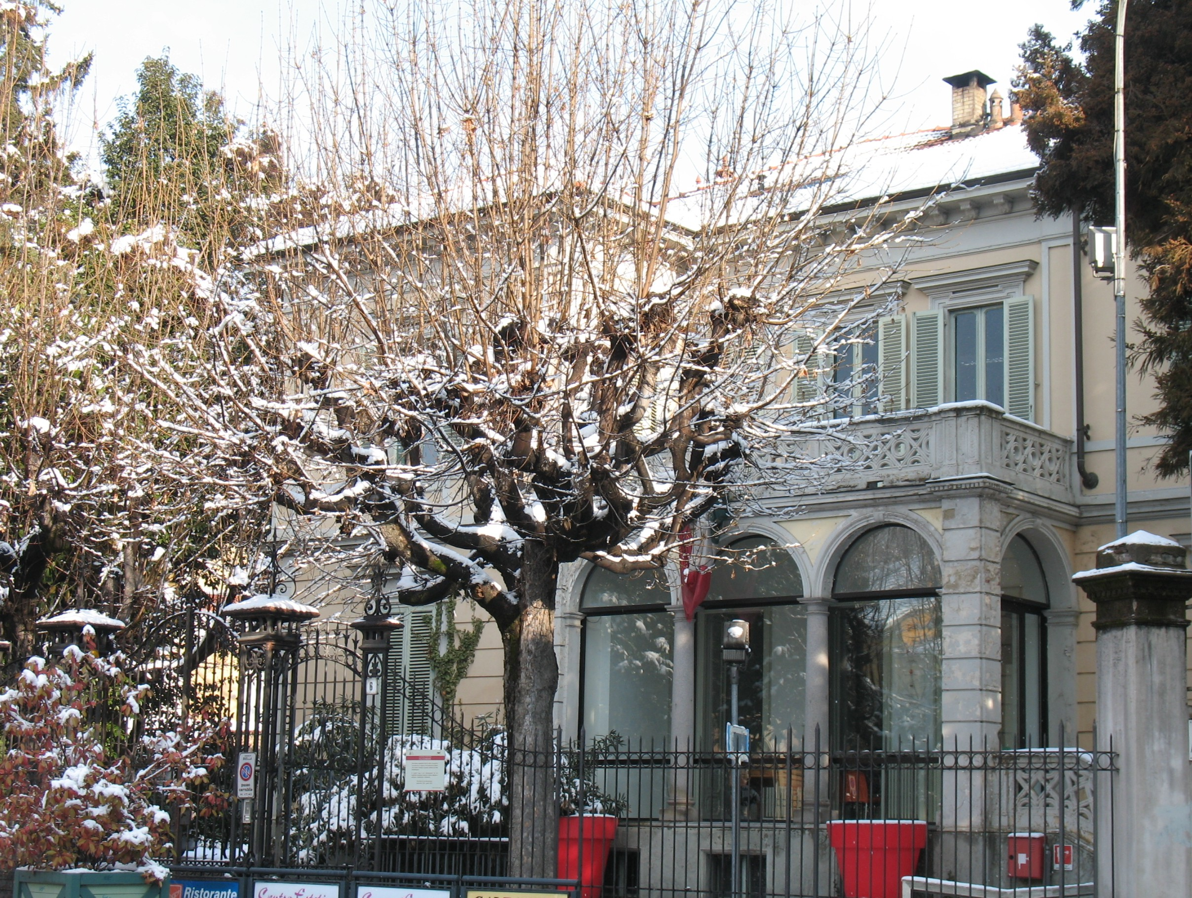 Prospetto di Villa Schneider, a Biella, Piemonte, Italia